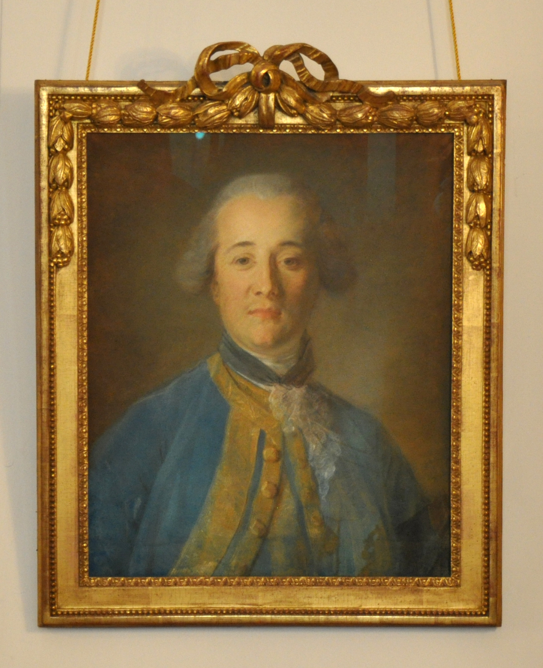 Jean-Baptiste Perronneau (1715-1783), portrait du Chevalier de Camiran, Pastel, v. 1756. Bordeaux, musée des Arts décoratifs et du Design.